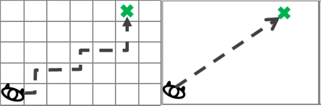 crowd simulation scheme: discrete vs continuous